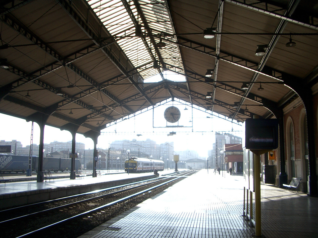 Otra más del interior de la estación de ferrocarriles del Norte en Valladolid, y es que su marquesina lo merece. (Aunque las fotos no le hagan justicia)